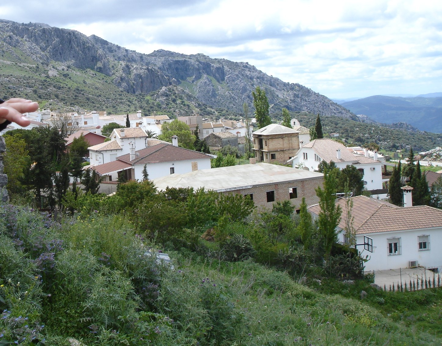 Vista de Benaocaz, Sierra de Grazalema (Spain)